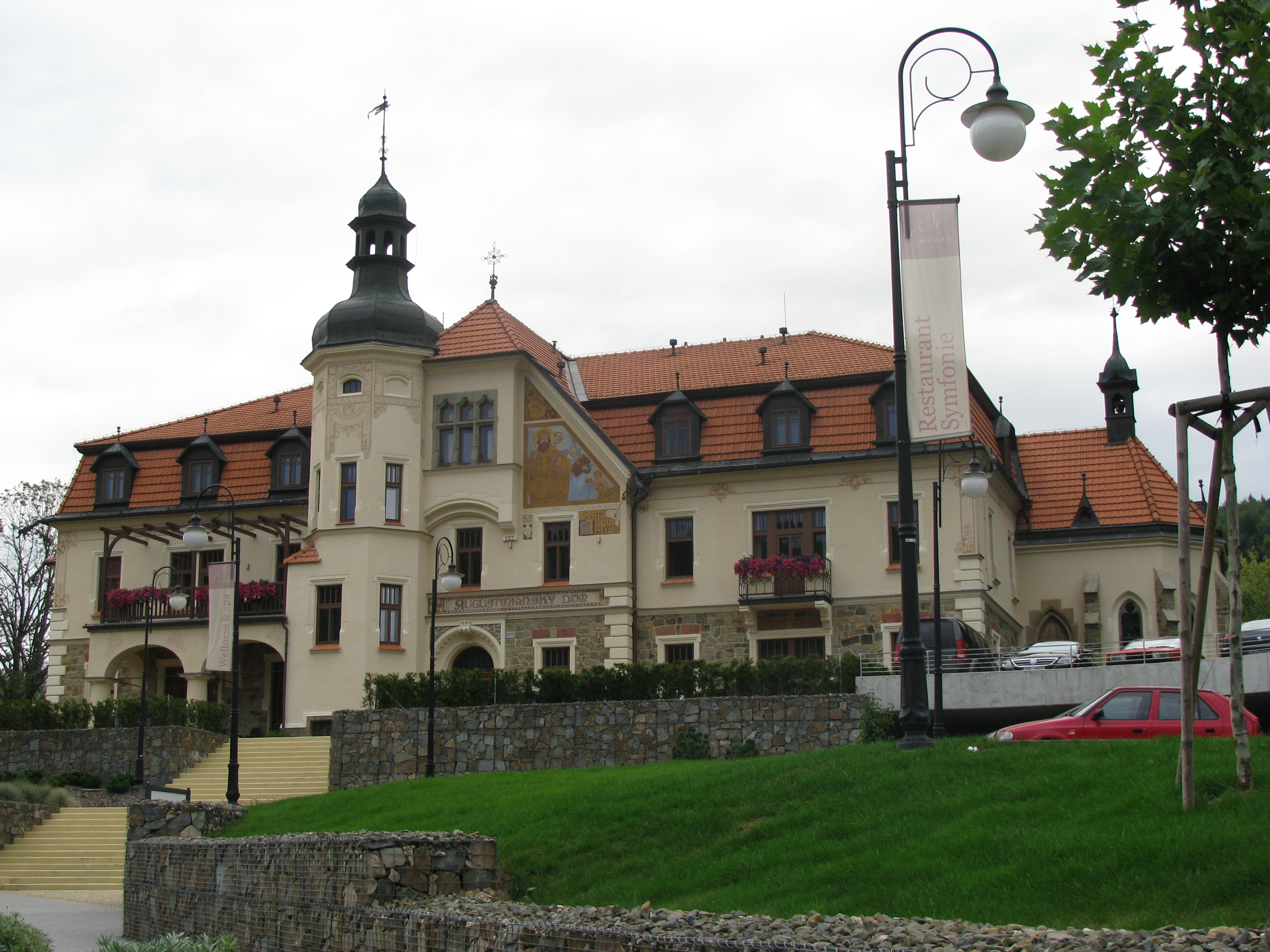 Vila tzv. Augustiniánský dům (Luhačovice), A. Václavíka 241, Luhačovice